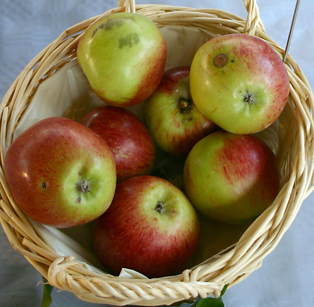 Malus "Roter Bellefleur", Büdingen